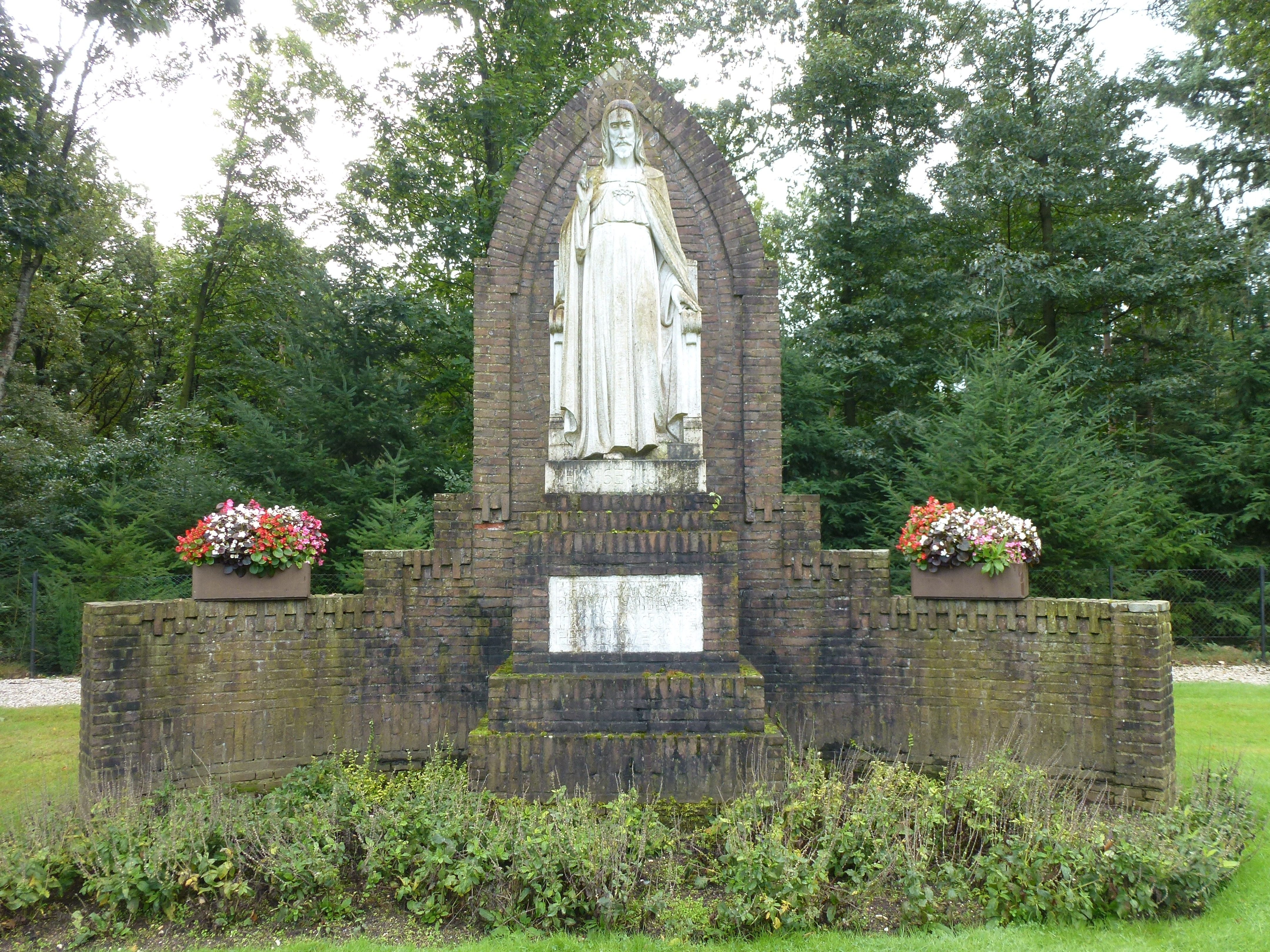 Dekkerswald Groesbeek, Nijmeegsebaan 31, Heilig Hart beeld